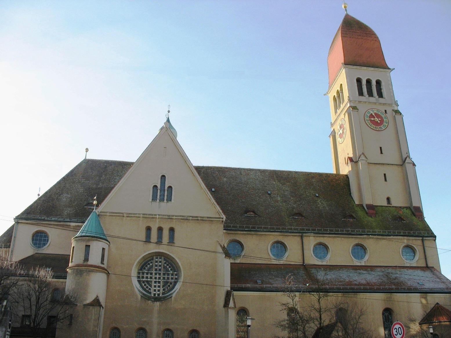 Stadtpfarrkirche Herz-Jesu Augsburg, Stadtteil Pfersee